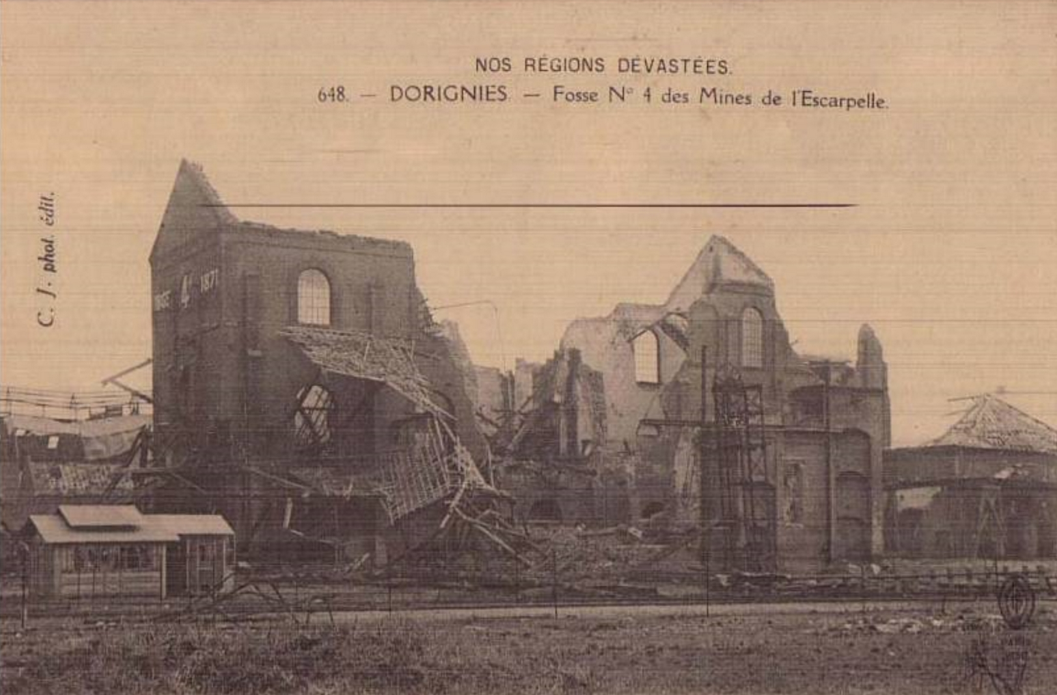 La Fosse n° 4 - 4 bis de la Compagnie des mines de l'Escarpelle était un charbonnage constitué de deux puits situé à Douai (Dorignies), Nord, Nord-Pas-de-Calais, France.